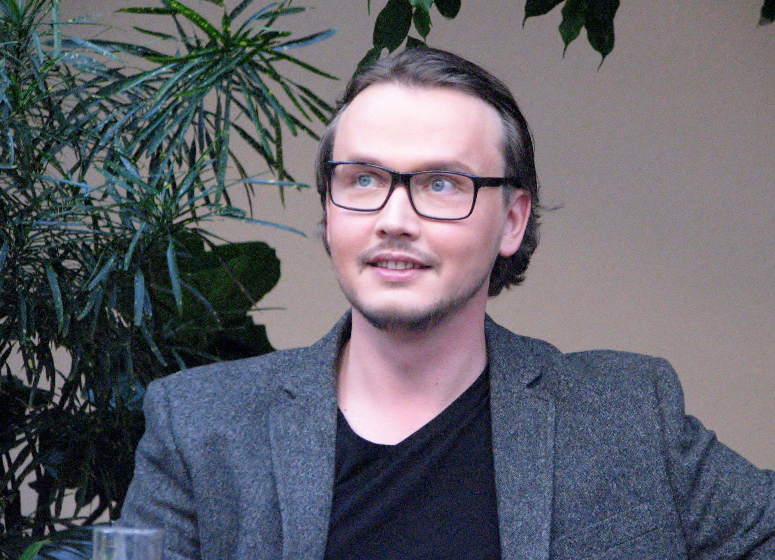 Andres Köster Estonia maja juubelipidustuste raames autogrammitunnis